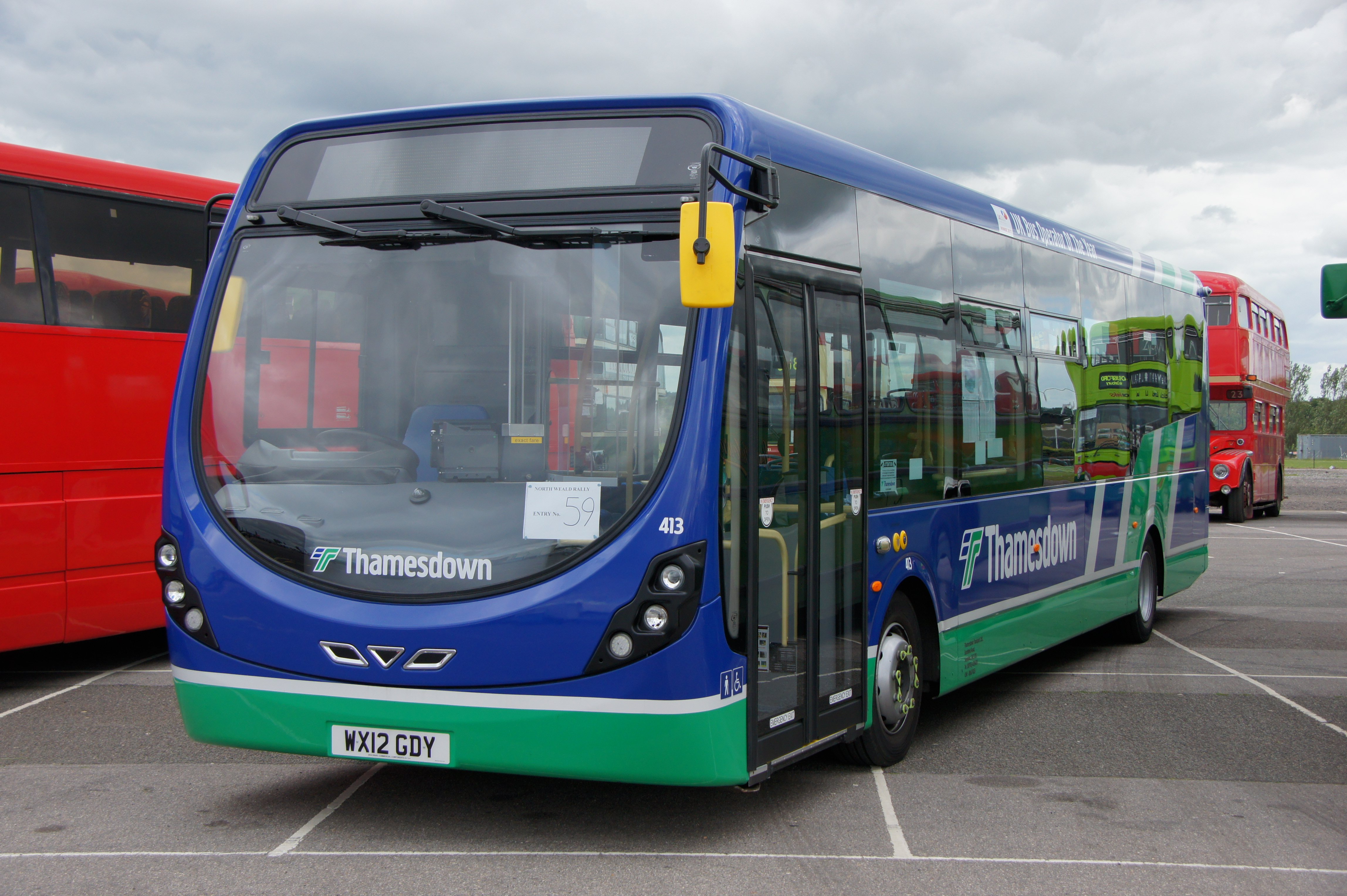 WX12GDY 010712 CPS